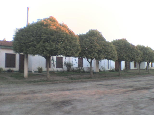 Casas familiares en Colonia Videla, Prov. de Córdoba.